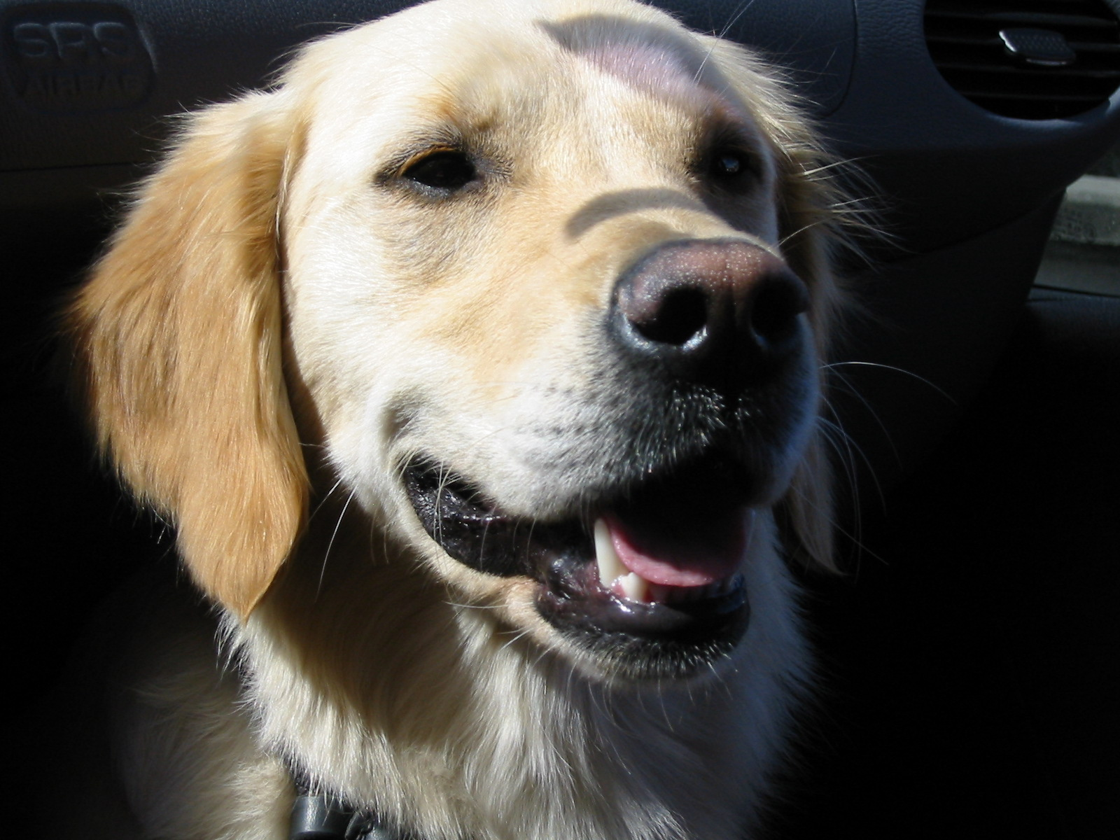 Golden Retriever „Hannah“, 1,5 Jahre alt